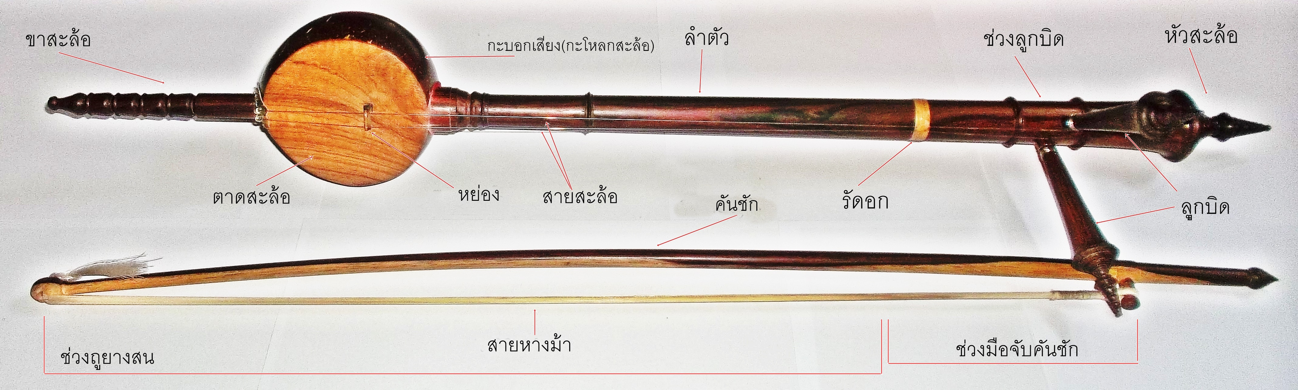 องค์ประกอบของสะล้อและคันชักพร้อมคำอธิบาย